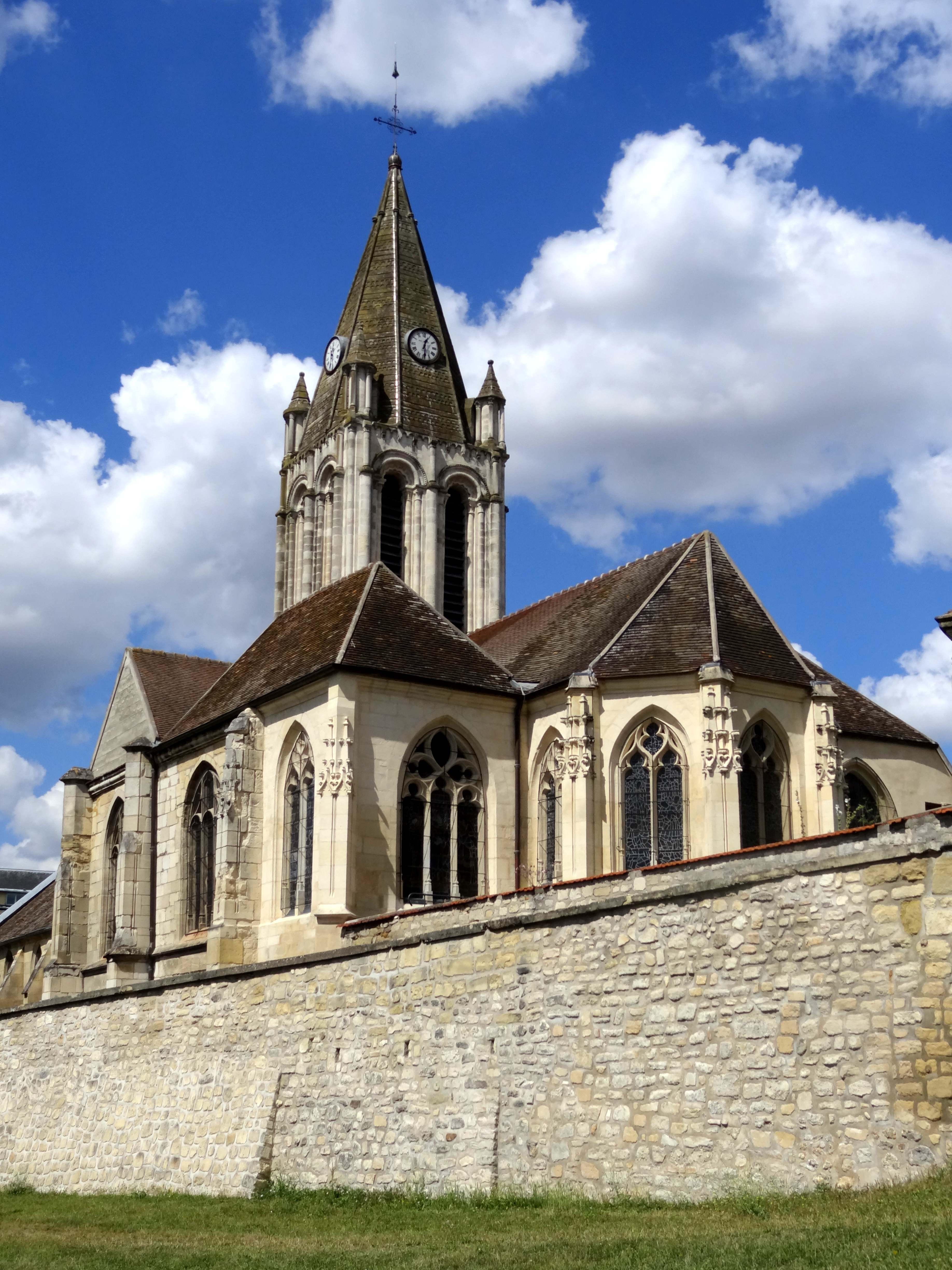 Église Saint-Maclou de Conflans-Sainte-Honorine - voir titre.